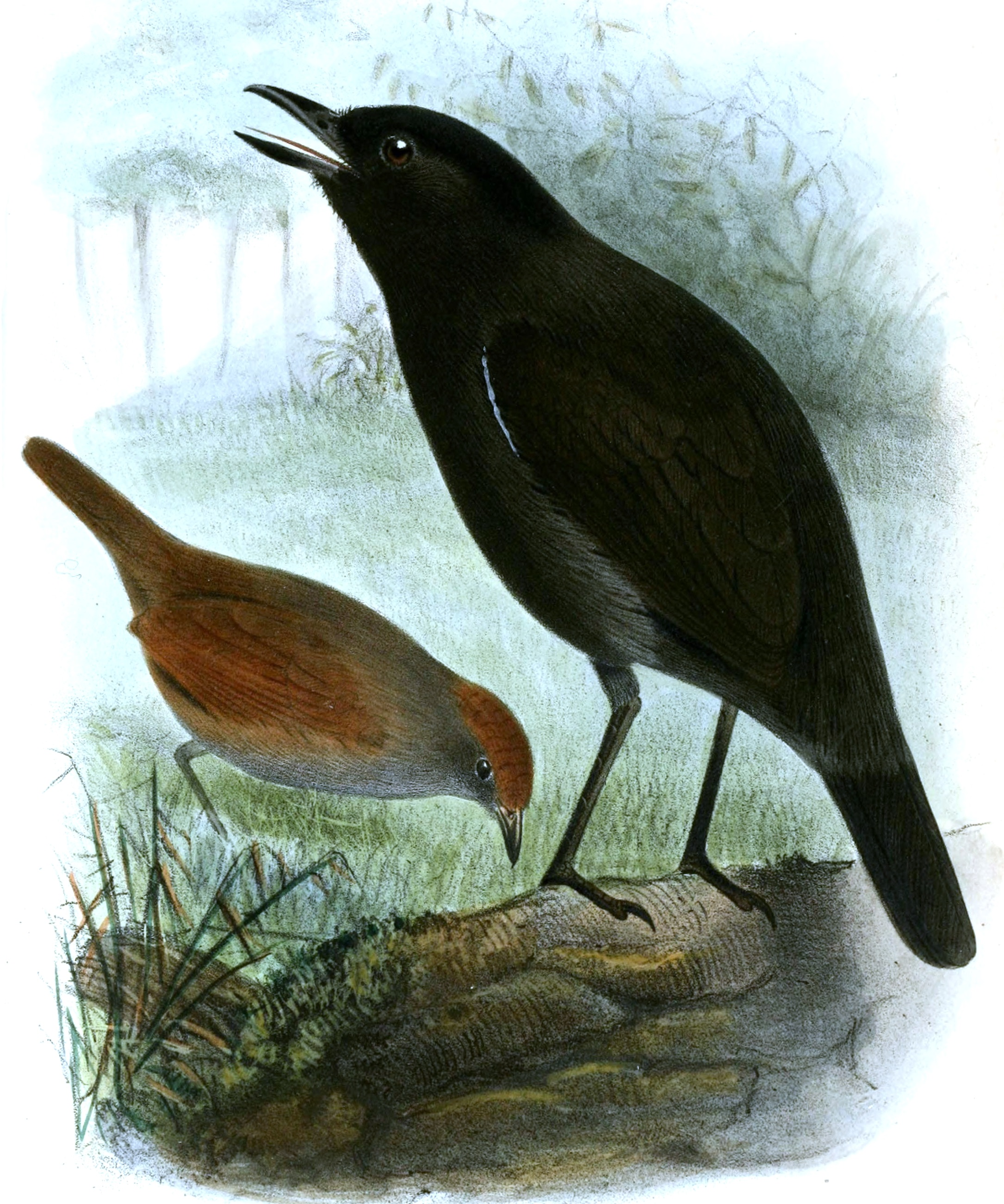 Percnostola funebris = Myrmeciza fortis P.L.Sclater & Salvin, 1868. Adulto macho a la derecha y adulto hembra a la izquierda.